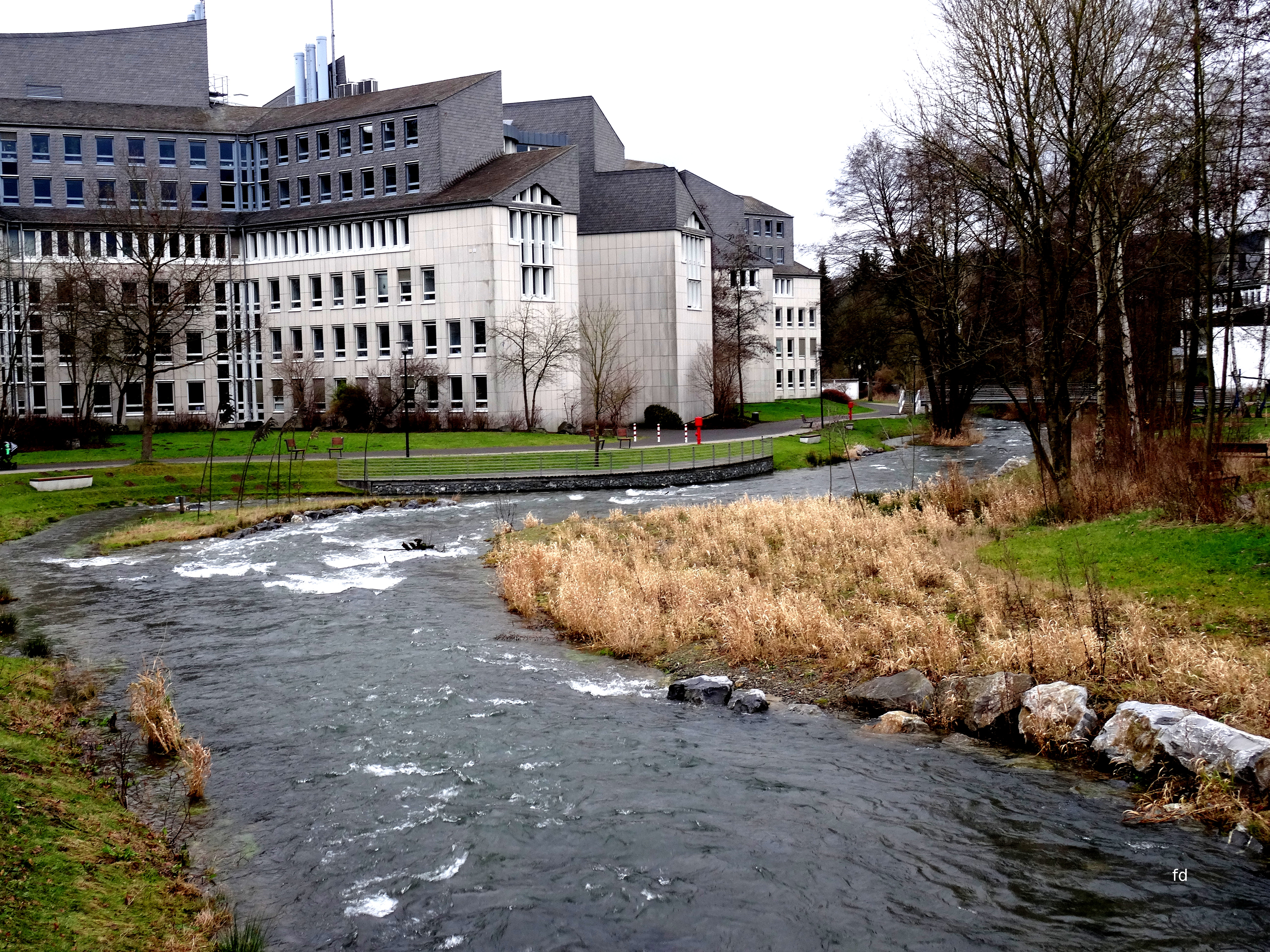 Am Hennepark